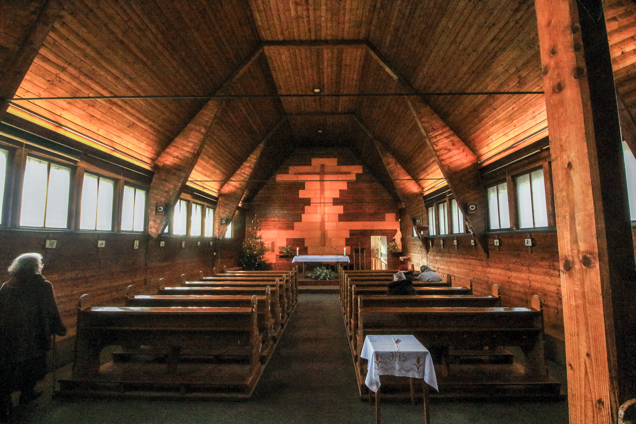 Praha-Krč, kostelík sv. Františka z Assisi